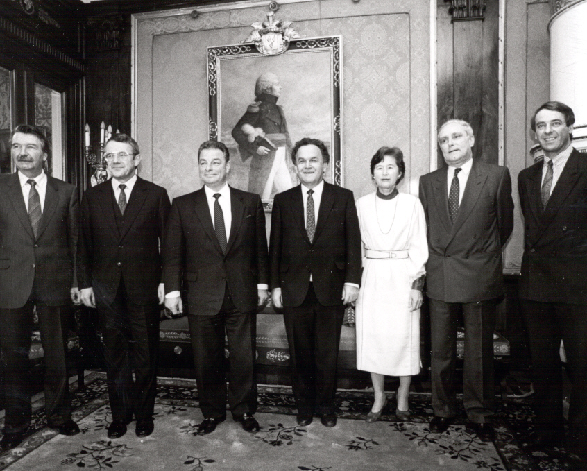 Der Schweizer Bundesrat 1987, mit der ersten Frau im Bundesrat: Elisabeth Kopp